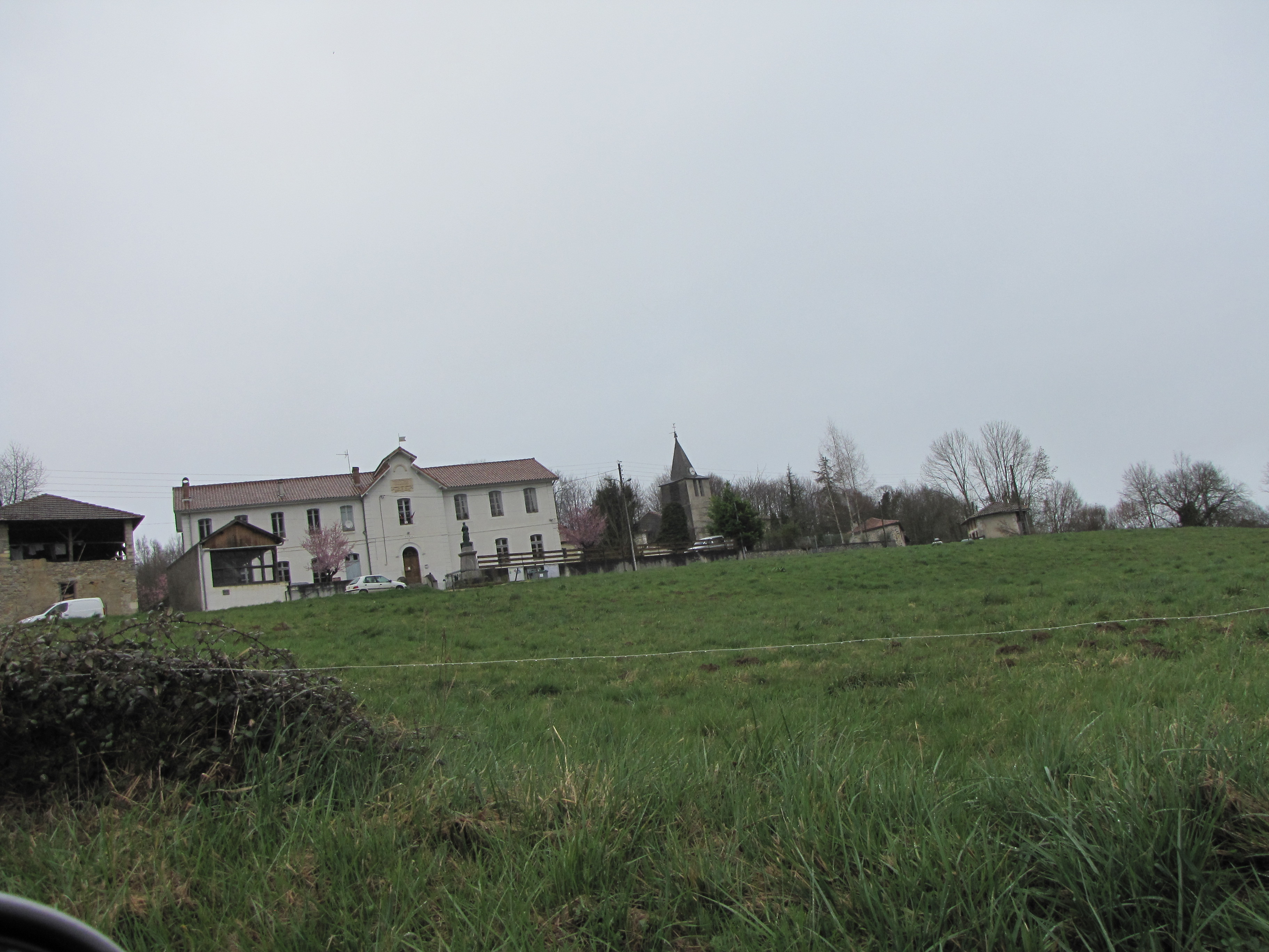 Estadens mairie